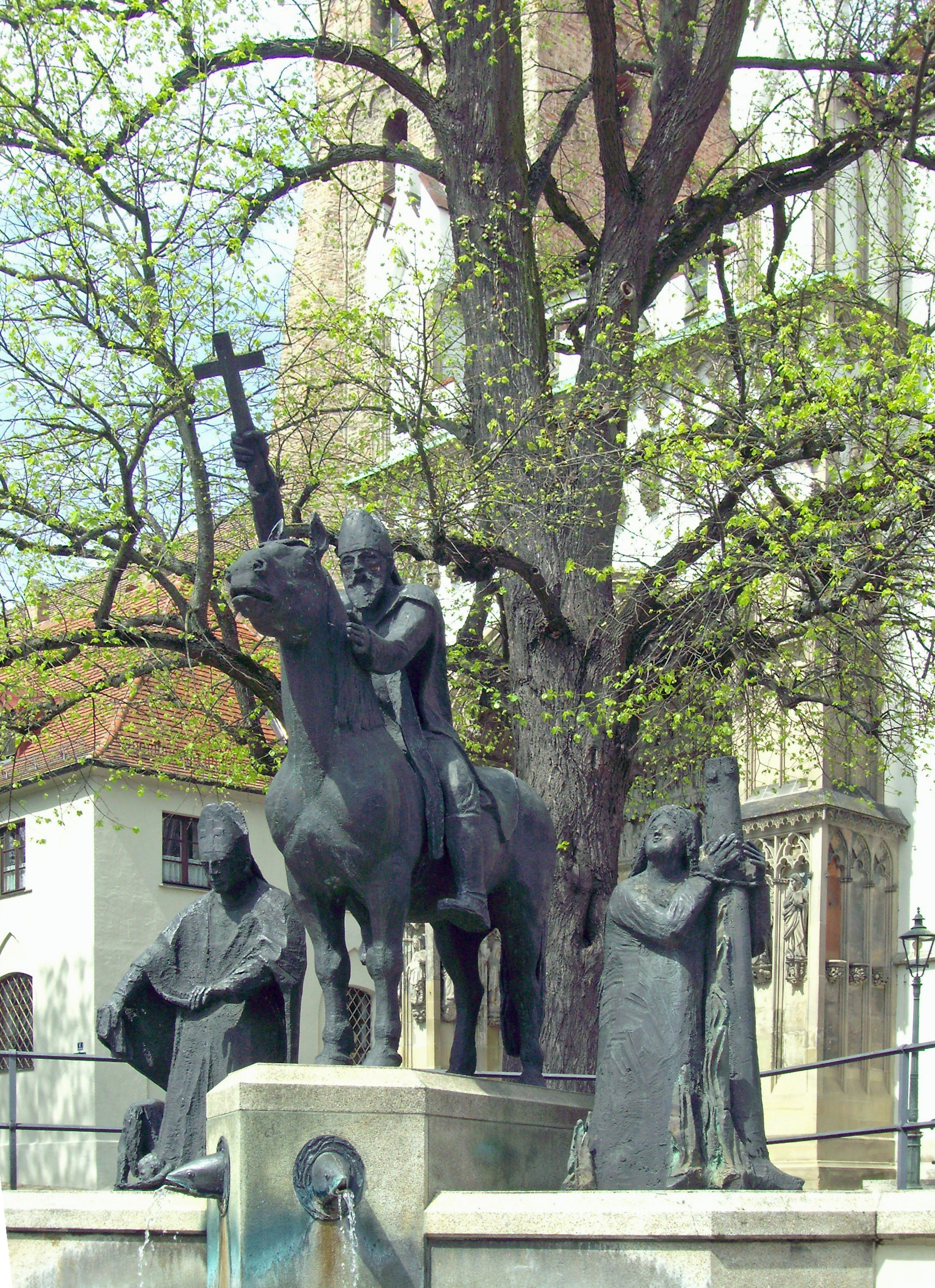 Statuen der Heiligen Simpert, Ulrich von Augsburg (Mitte) und Afra von Augsburg vor dem Augsburger Dom Unserer Lieben Frau.